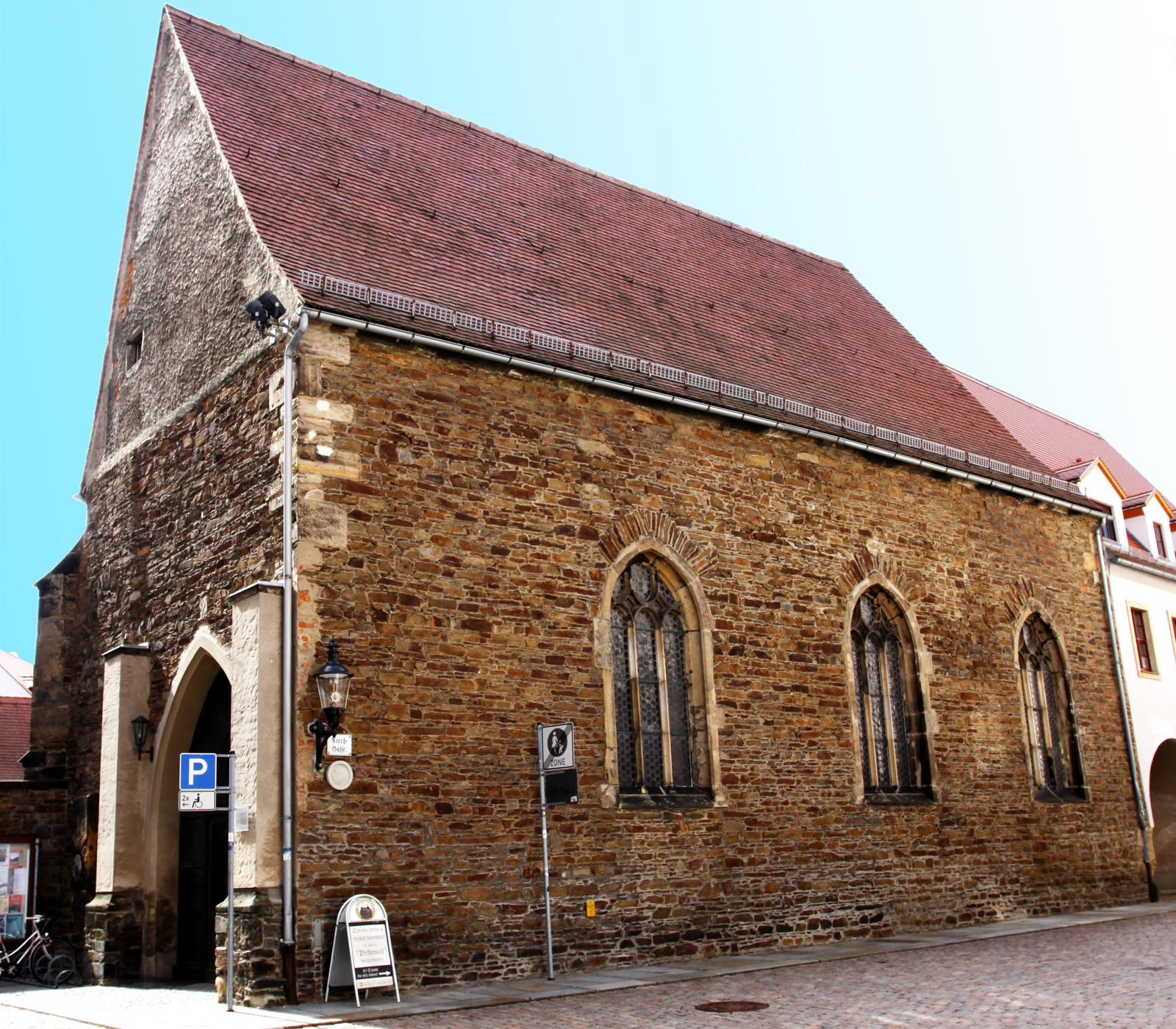 Die Annenkapelle im Ensemble des Freiberger Doms Sankt Marien